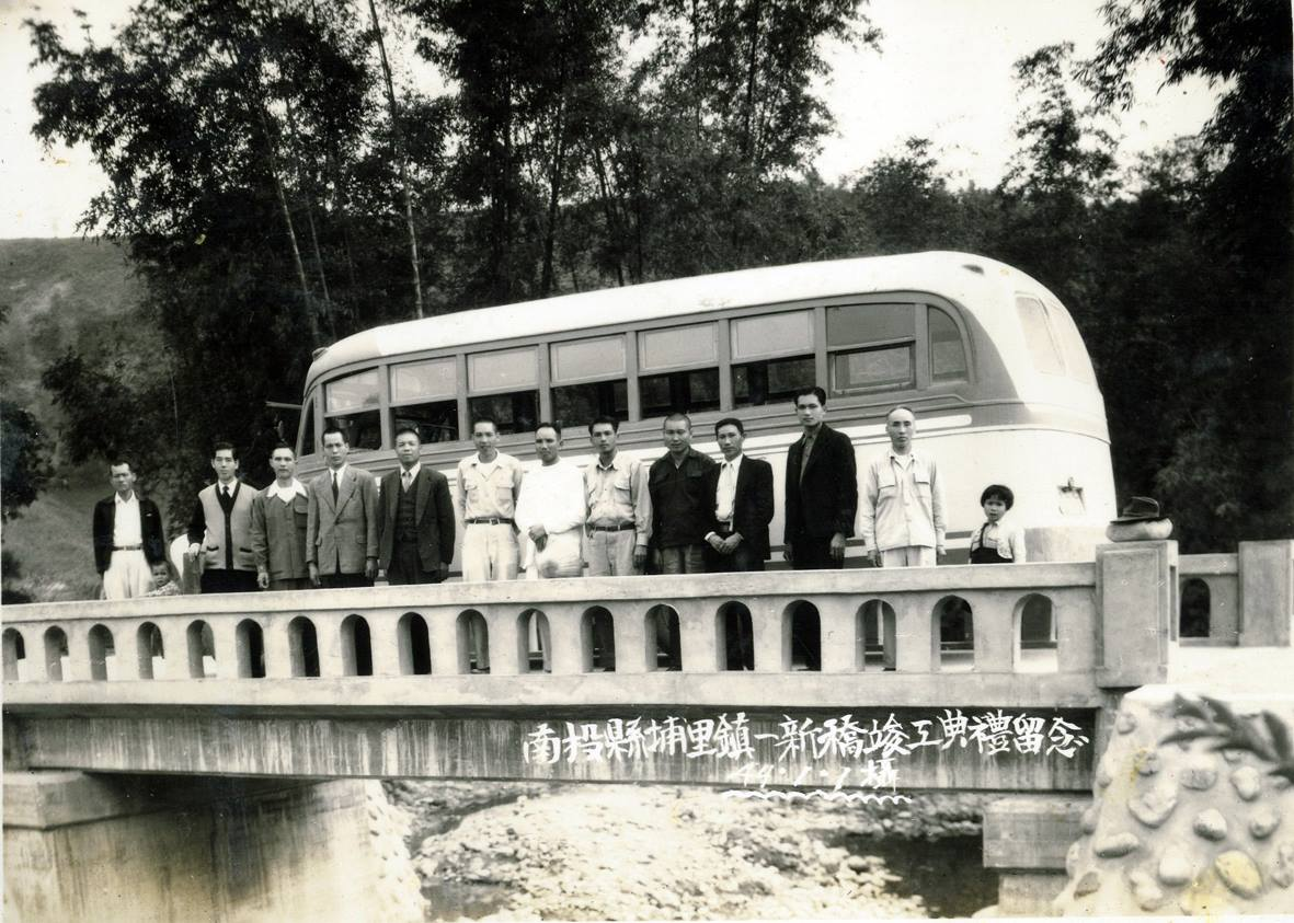 中文（台灣）: 民國44年1月，埔里牛眠、福興、史港、一新、廣成、向善等里的住民，先於參贊堂聖廟舉行永興路一新橋、永興橋兩橋新建暨參贊堂修建竣工典禮，包括各機關、縣議員、地方仕紳參加人數超過一千人，熱鬧盛大。一新橋與永興橋是埔里重要的農村大路，為水尾通行永興路之重要橋樑，由里民有錢出錢、有力出力捐建完成，一新橋寬4米，長8.5公尺，永興橋則長11公尺，均以鋼筋混凝土建成。埔里鎮長巫重興特頒獎表揚一新里長張建燈、鎮民代表張建勳、陳發萬等有功人員。圖為當時的一新橋竣工典禮合影照片，埔里鎮長巫重興(左五)與地方人士們特別與一輛山民汽車客運公司(今已改組成南投客運)的客運車一起合影，慶賀山民客運可以從此通行服務這個鄉間路線，居民出入交通將更便利。